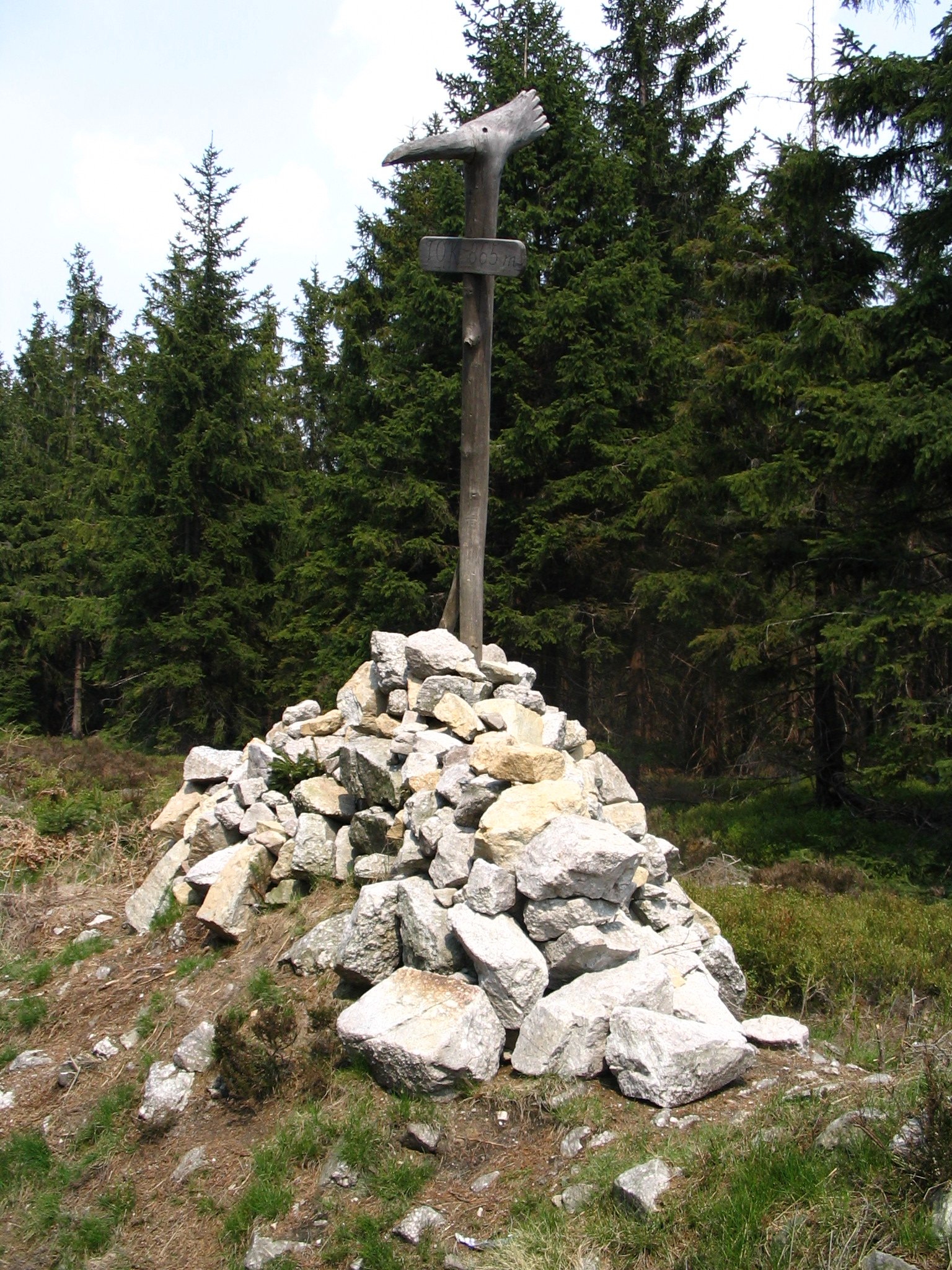 Vrchol Toku na kraji vojenské cesty